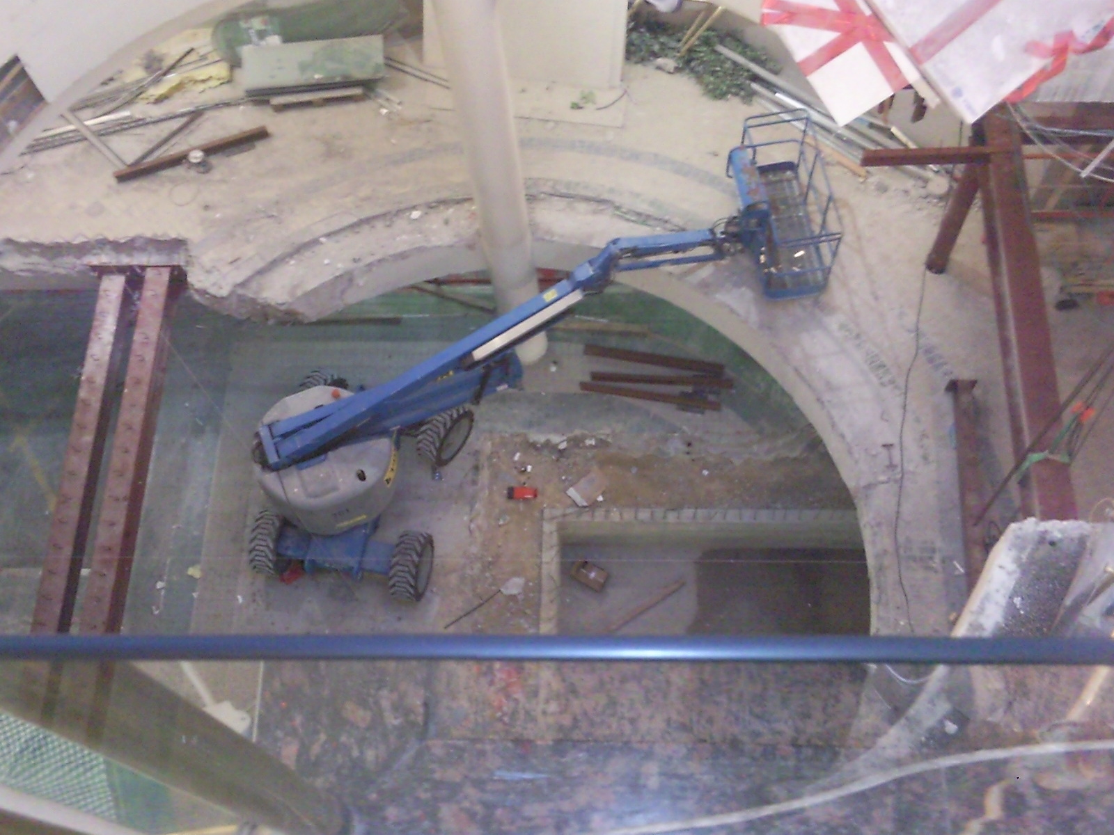 תהליך הרחבת קניון השרון